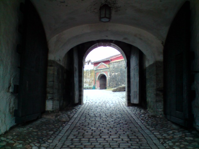 Porter